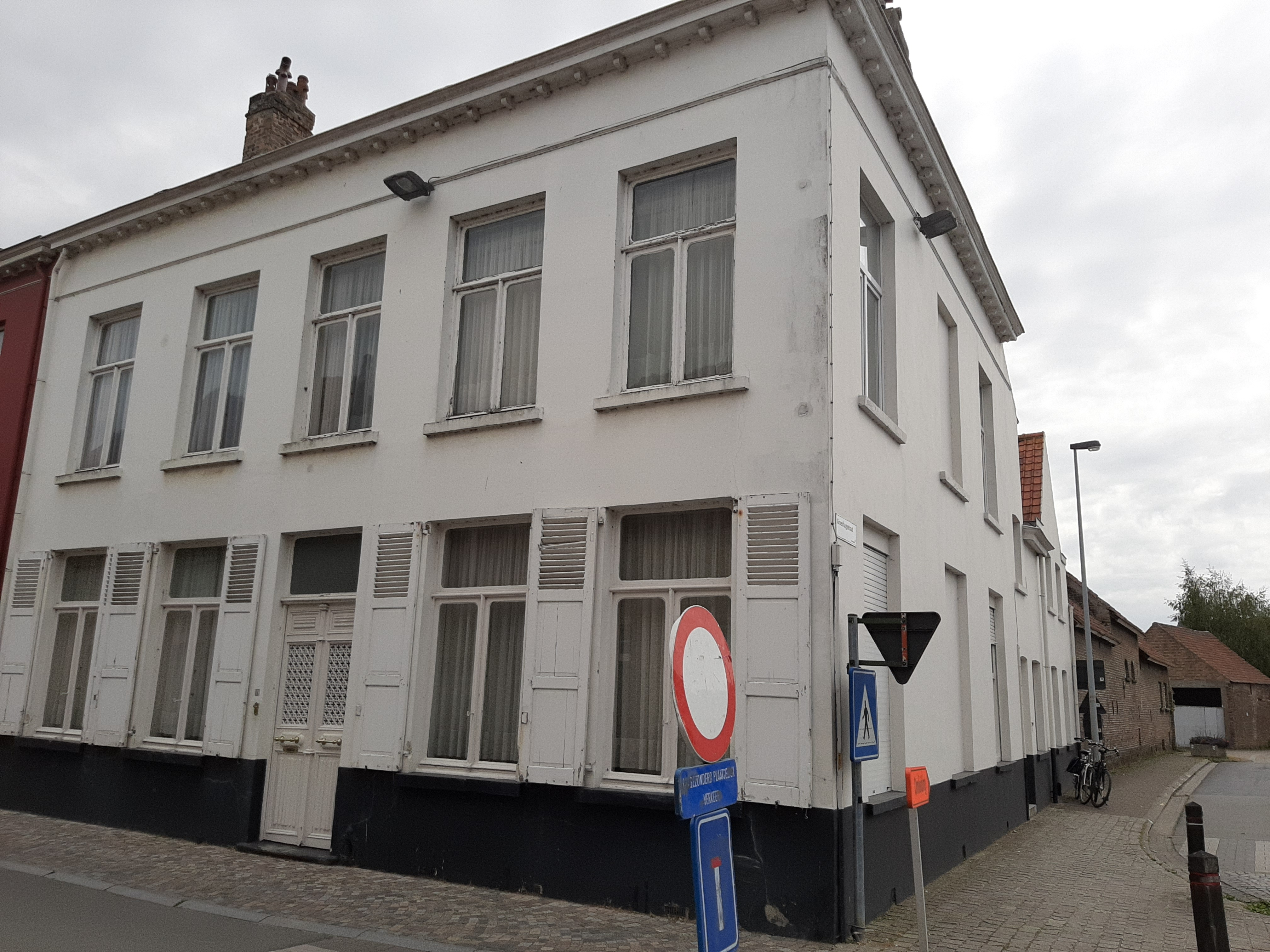 Neoclassicistisch herenhuis Dorpsstraat71